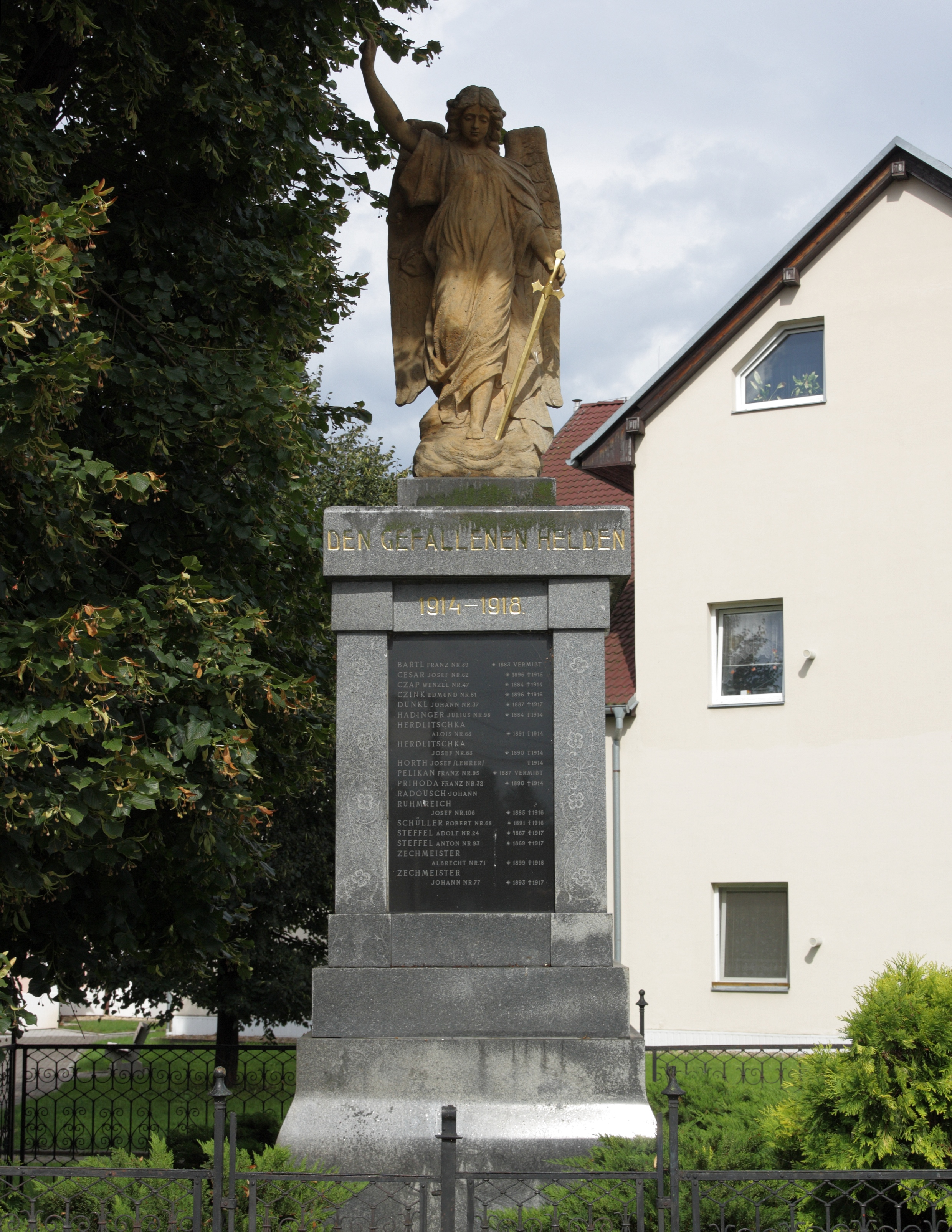 Malešovice - pomník padlým 1914-1918.